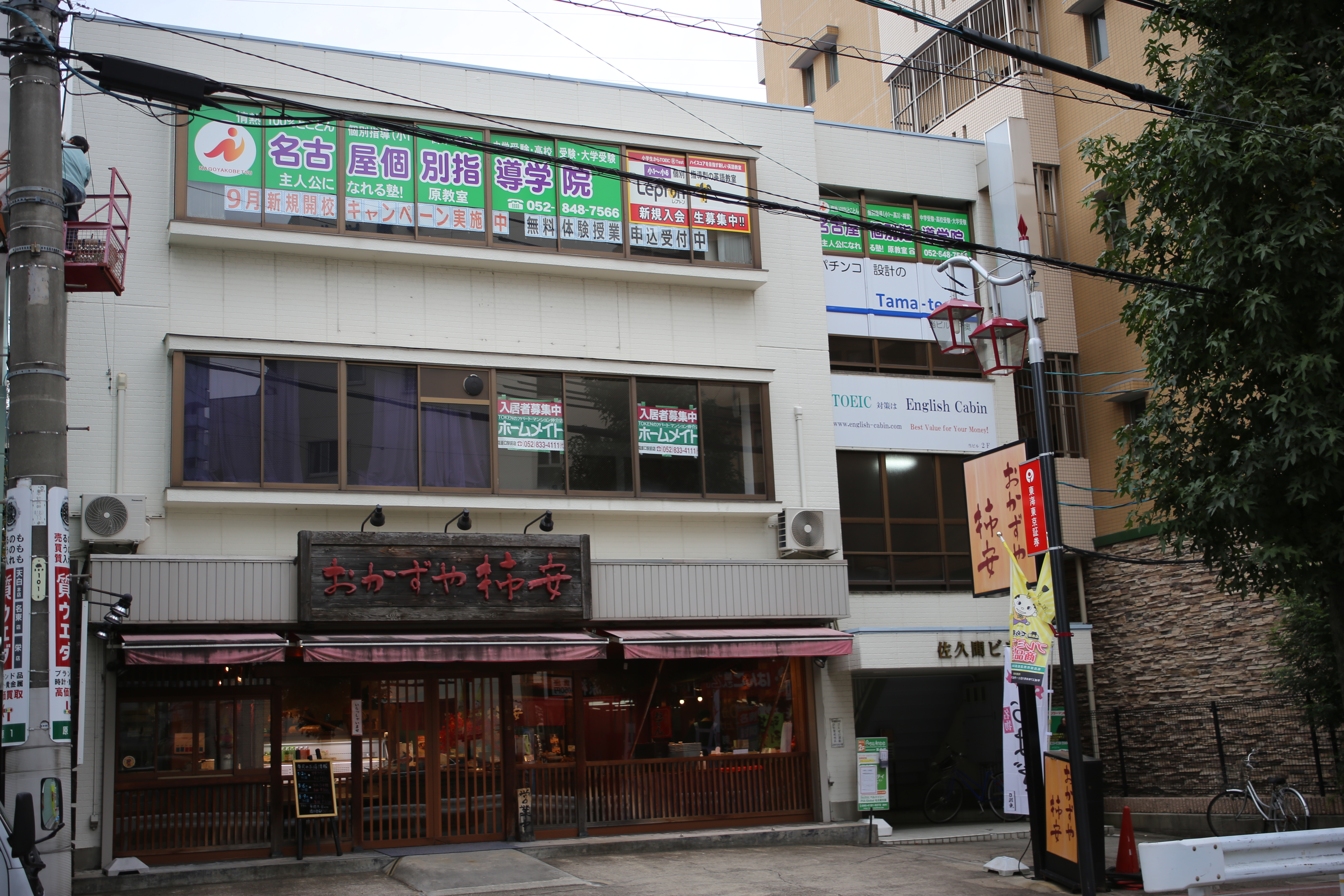 名古屋市天白区原一丁目の佐久間ビルを東側公道南側より撮影。1階にはテナントとして「おかずや柿安」が入居する。